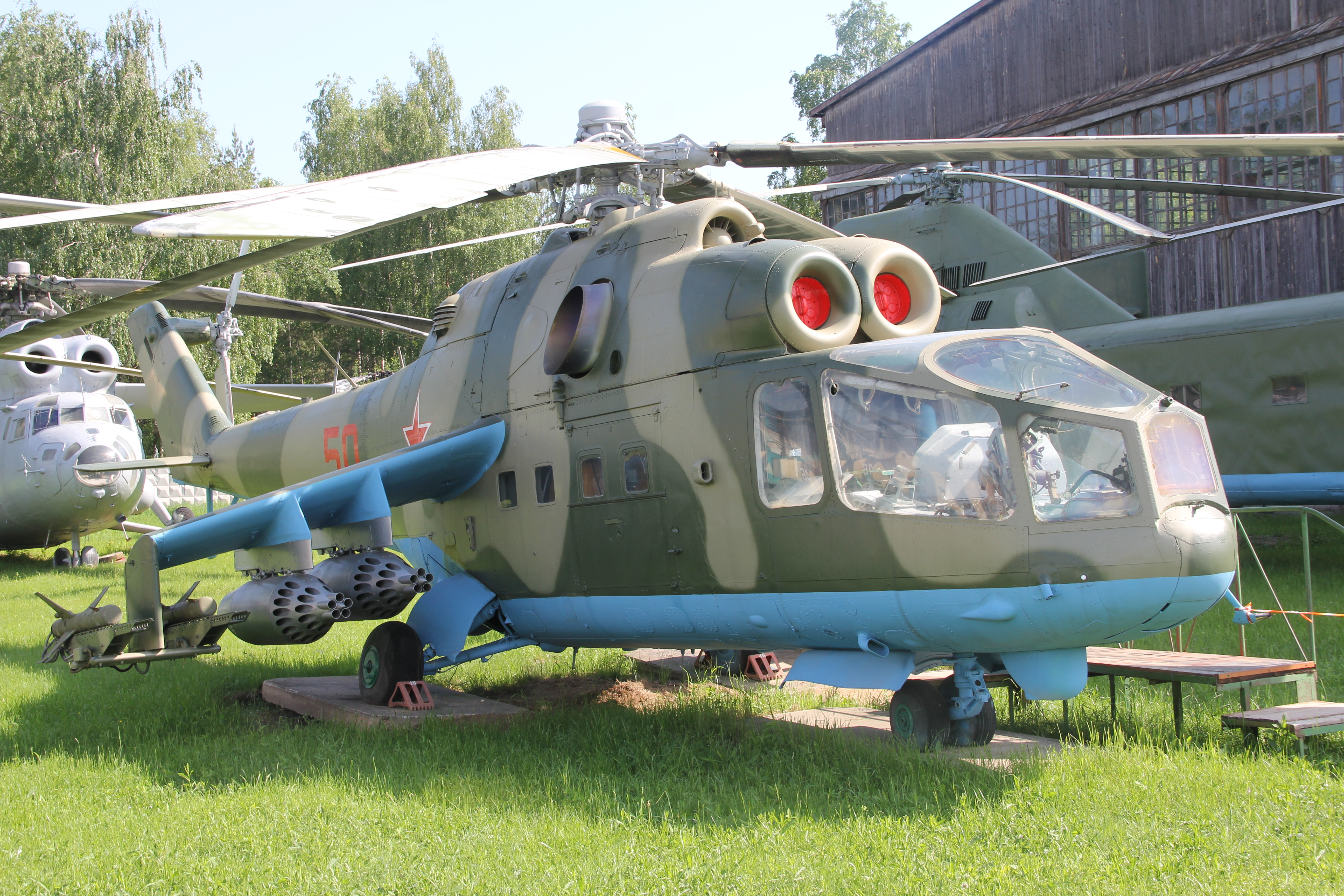 Mil Mi-24A